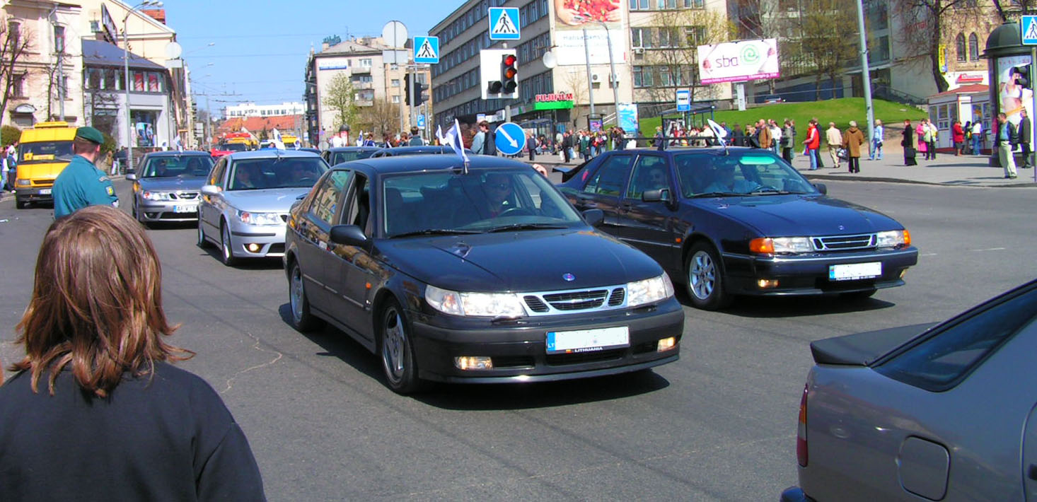 Saab 9-5 MY1998-2001 2005 metų parade, šalia - Saab 9000